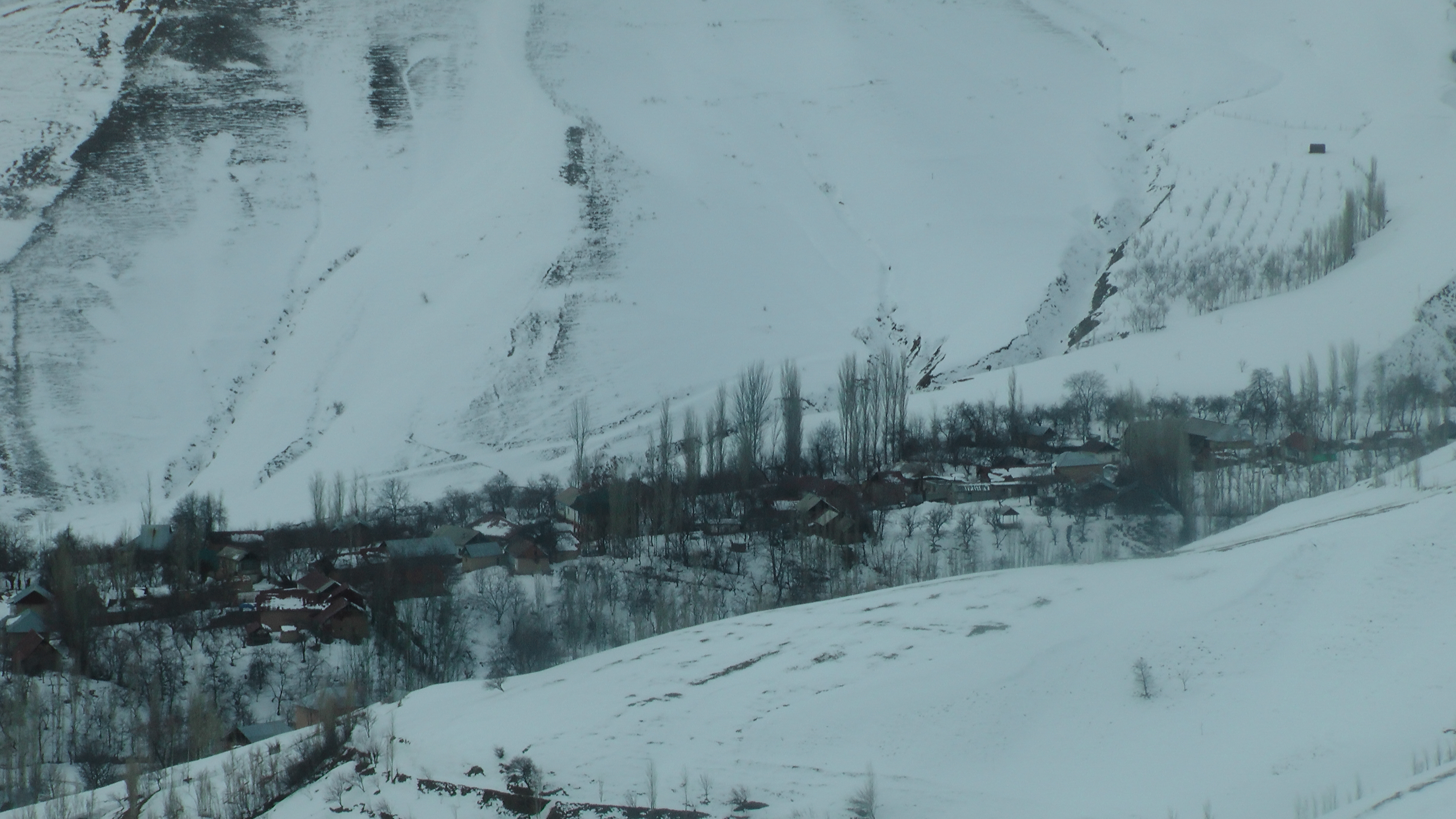 Тоҷикӣ: Дараи Гӯсфандак